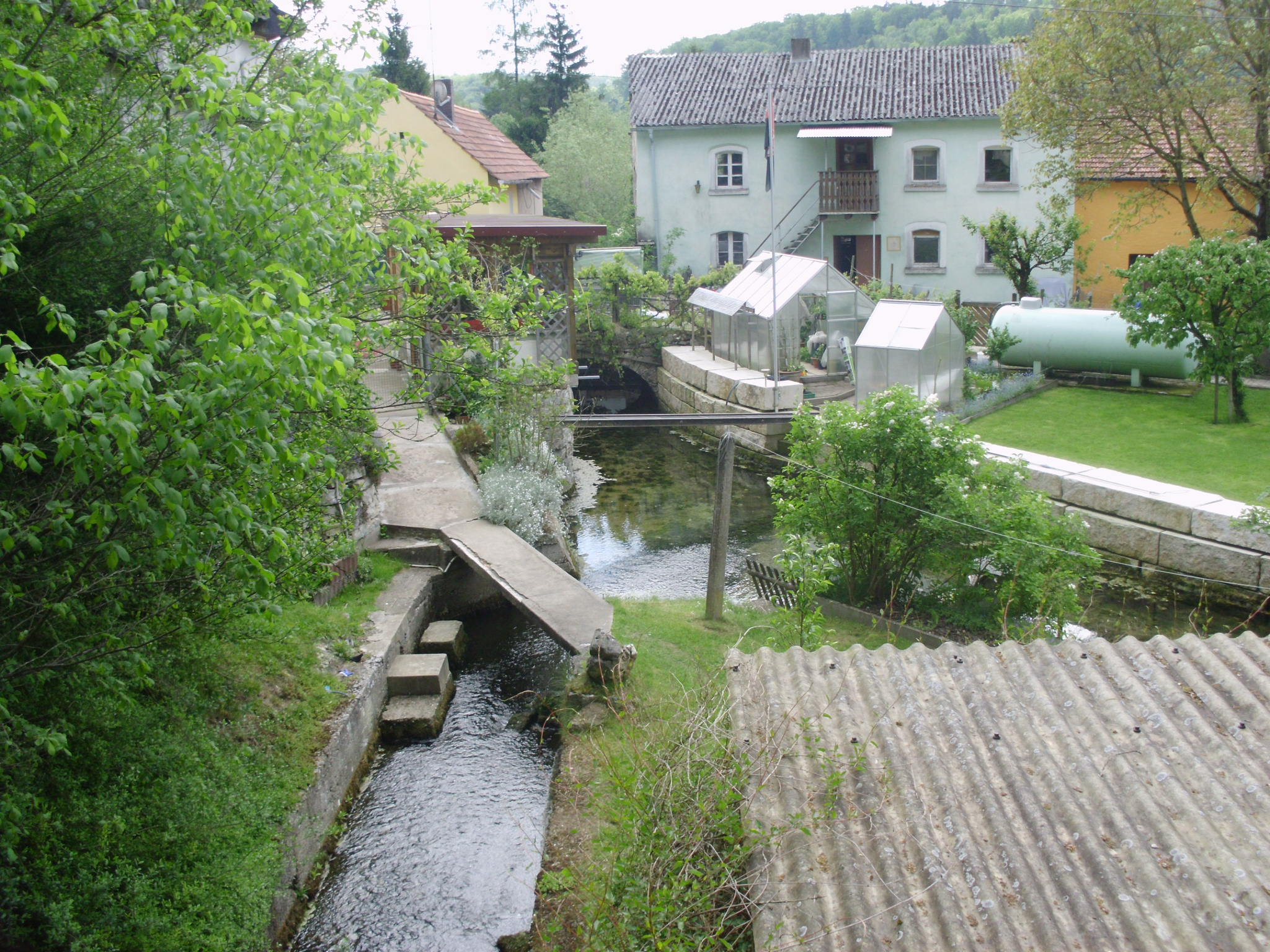 Fuchsmühle am Möhrenbach, Ortsteil von Treuchtlingen im mittelfränkischen Landkreis Weißenburg-Gunzenhausen